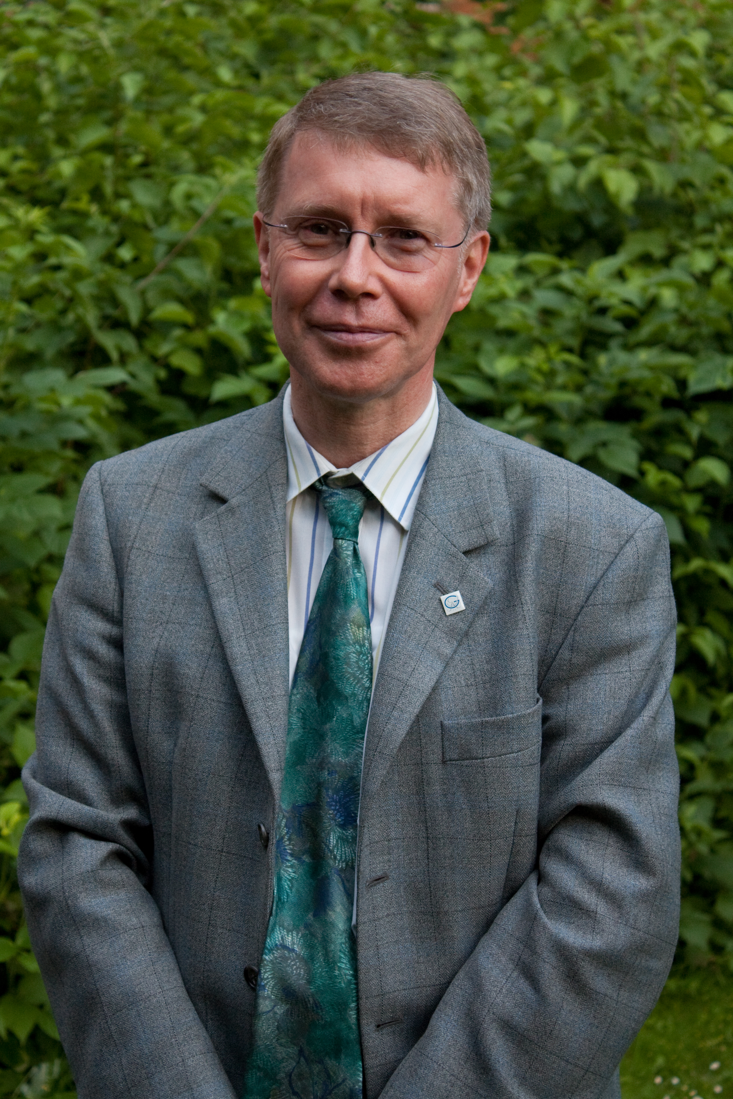 Heinz-Günther Nesselrath, Professor für Klassische Philologie/Gräzistik an der Universität Göttingen, während des III. Abends der antiken Literatur vor dem Seminar für Klassische Philologie.